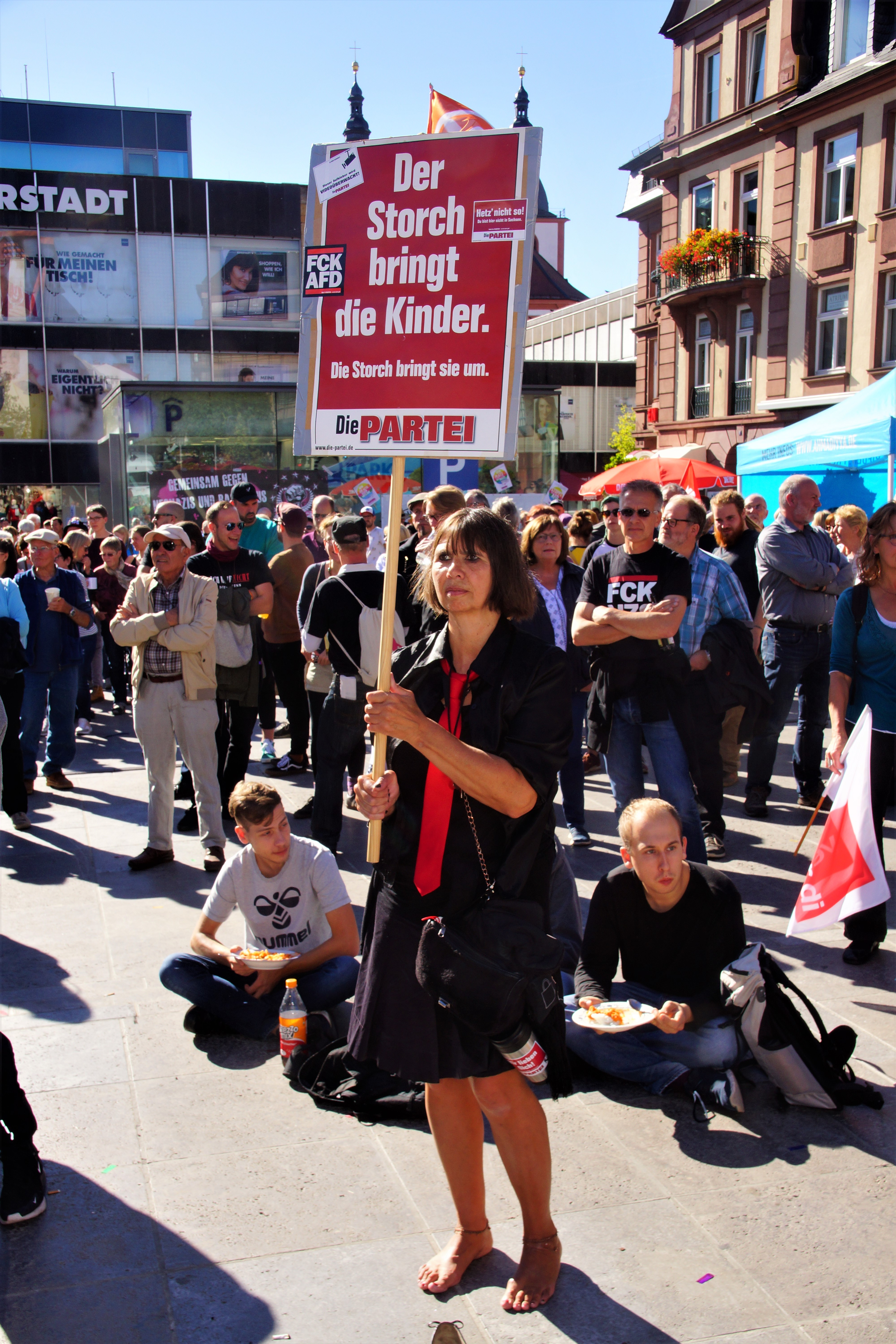 Plakat von DIE PARTEI